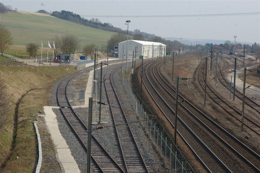 La ligne Paris-Strasbourg à Tronville-en-Barrois. Le centre d'essais ferroviaire d'Alstom où a lieu la mise au point de la rame TER "Régiolis"